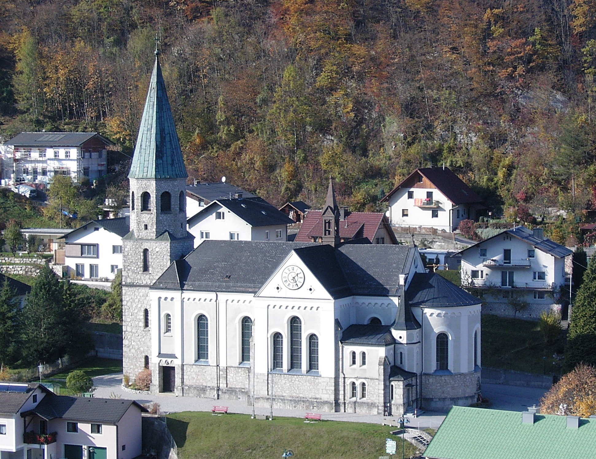 Reichraming Katholische Pfarrkirche Heiliger Franz von Sales Oberer Kirchenberg, Südansicht